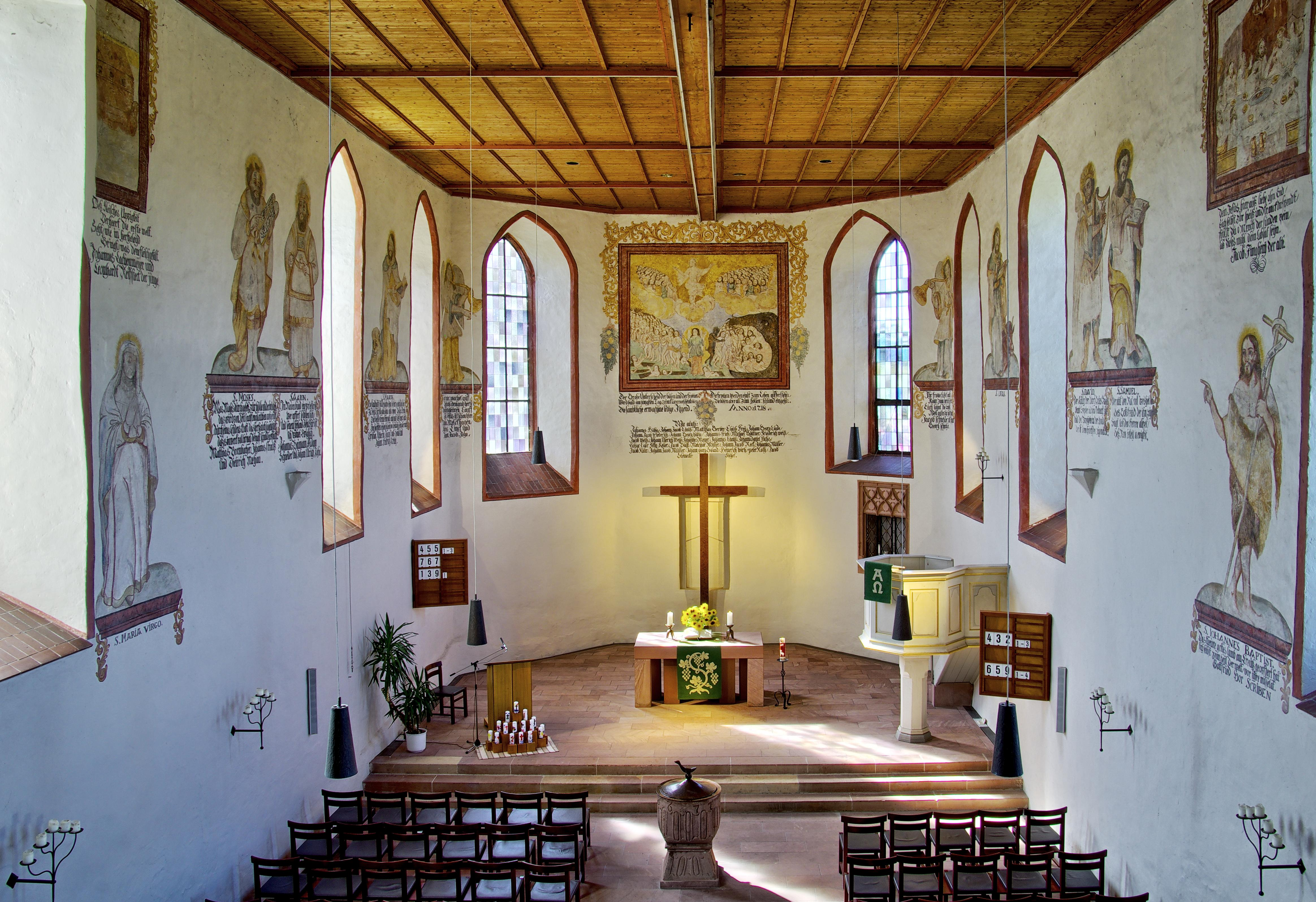 Bergkirche Nimburg, Innenansichten